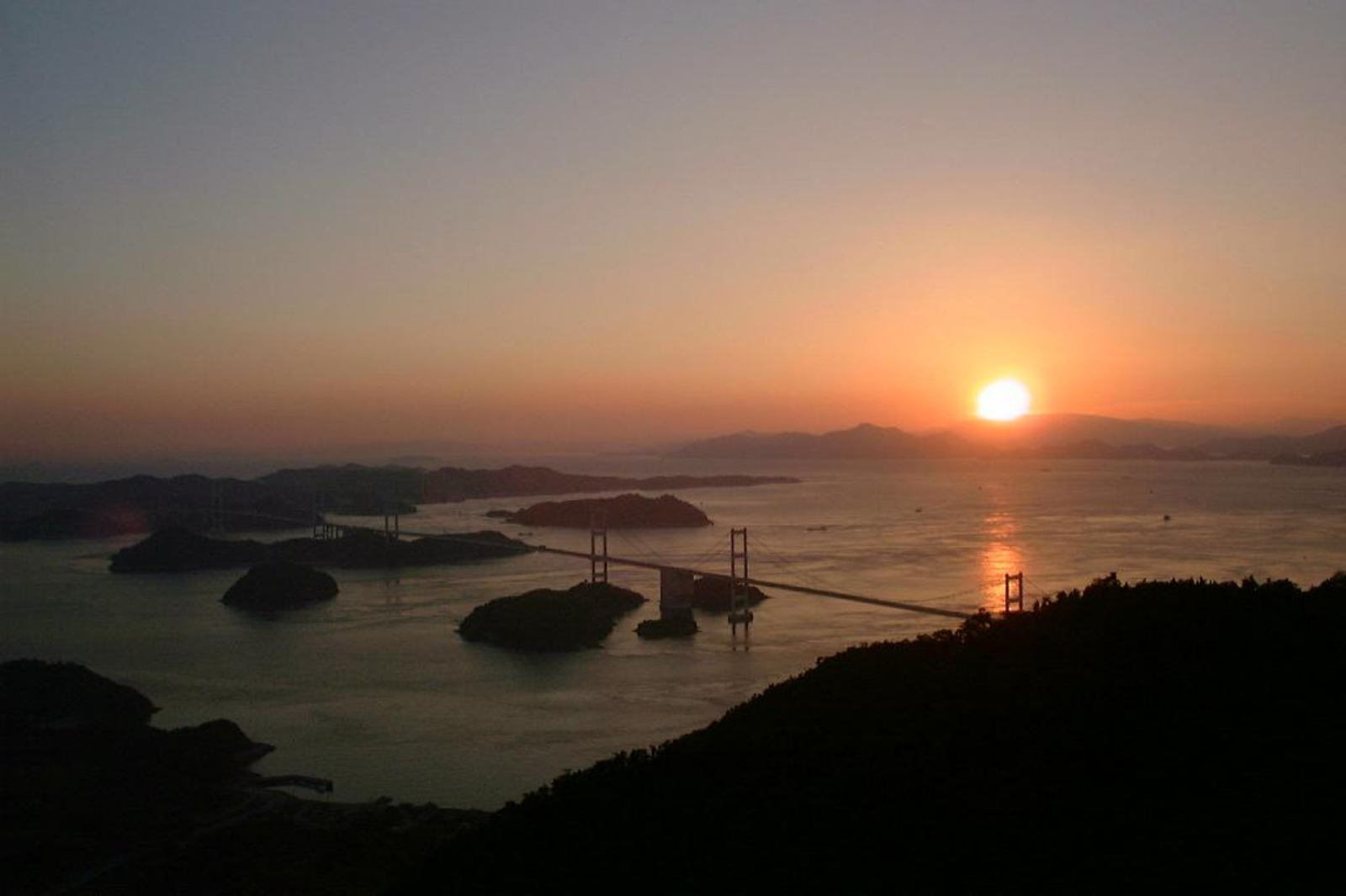 伊予大島の亀老山展望台からの夕景